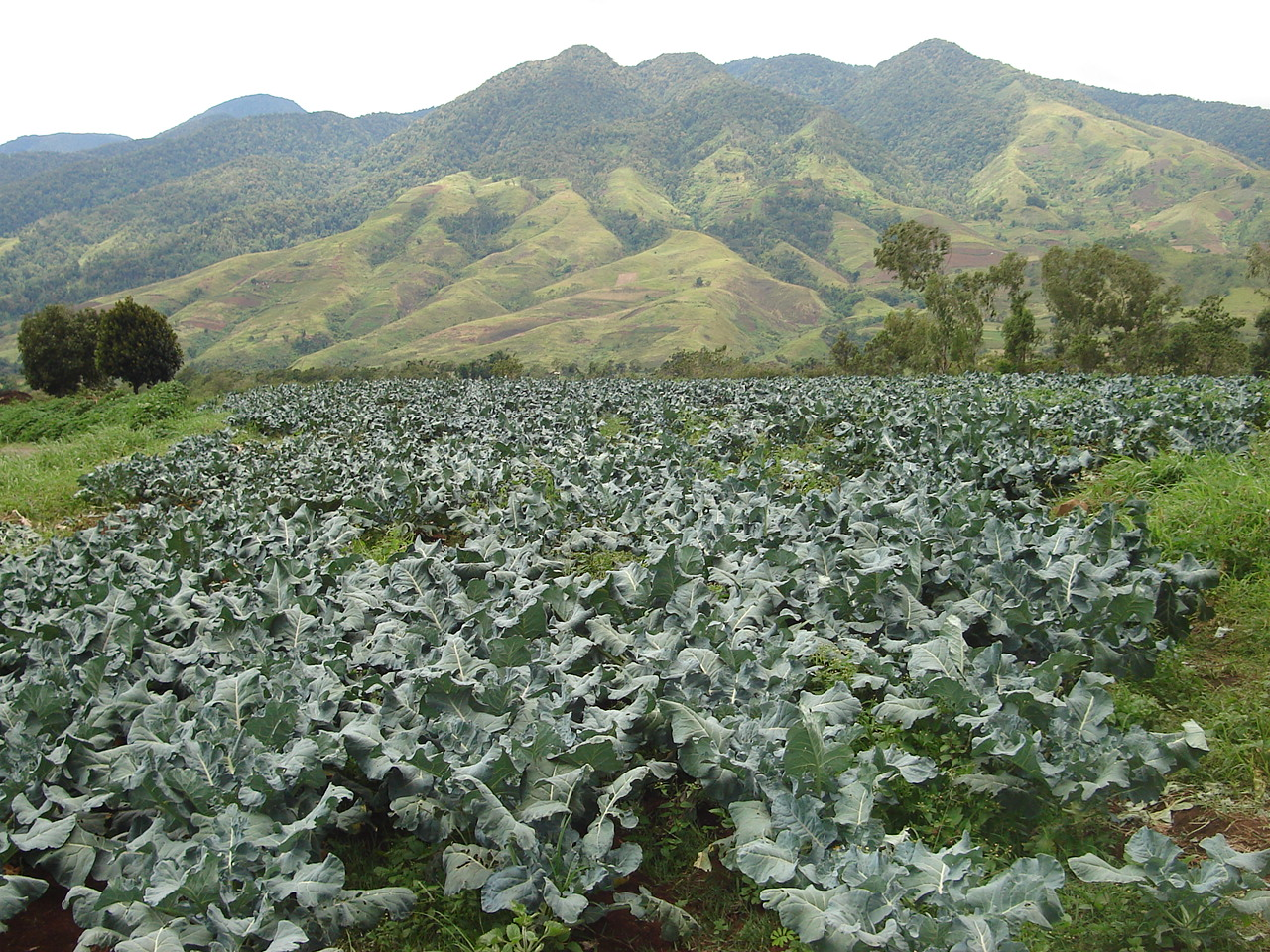 Kalatungan Mountain Range viewed from Kibangay, Lantapan, Bukidnon